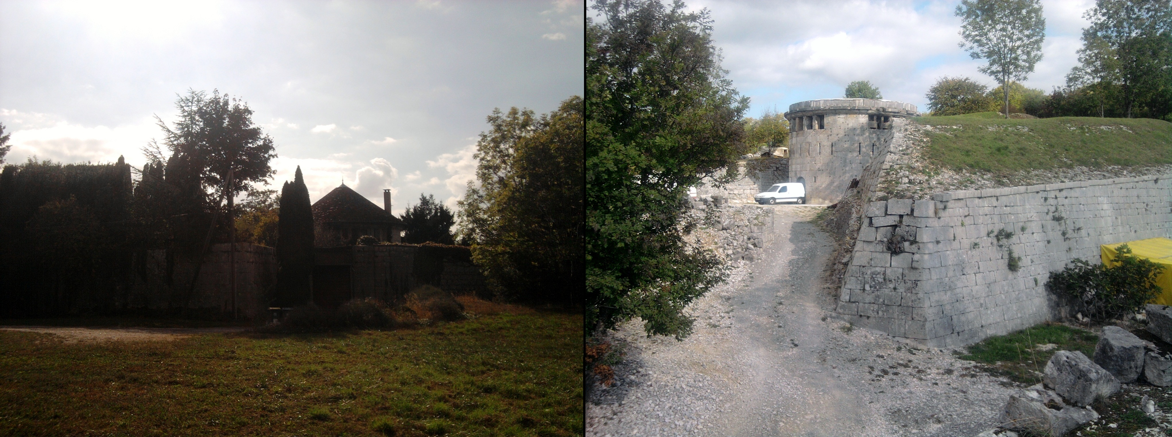 Lunettes de Tousey et Trois-Châtels, à Besançon.